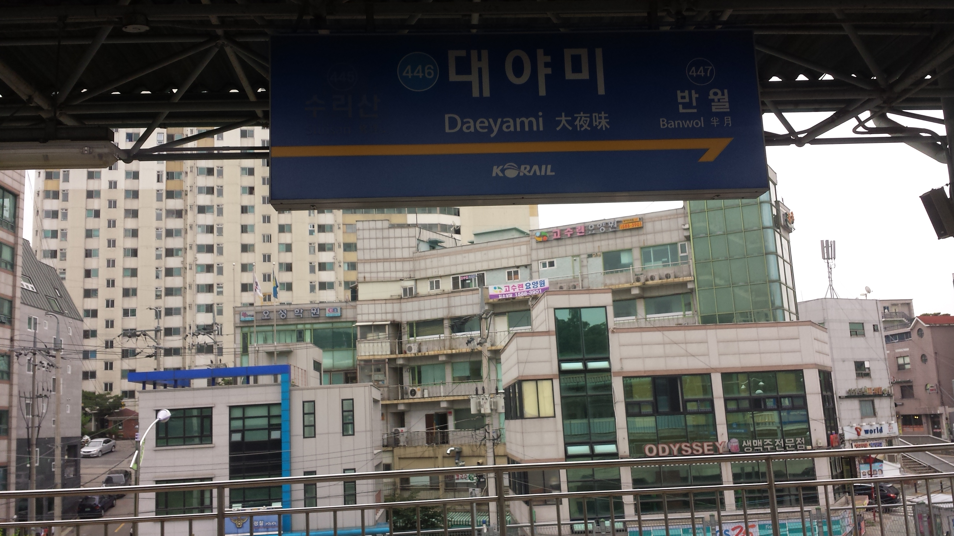 대야미역 역명판